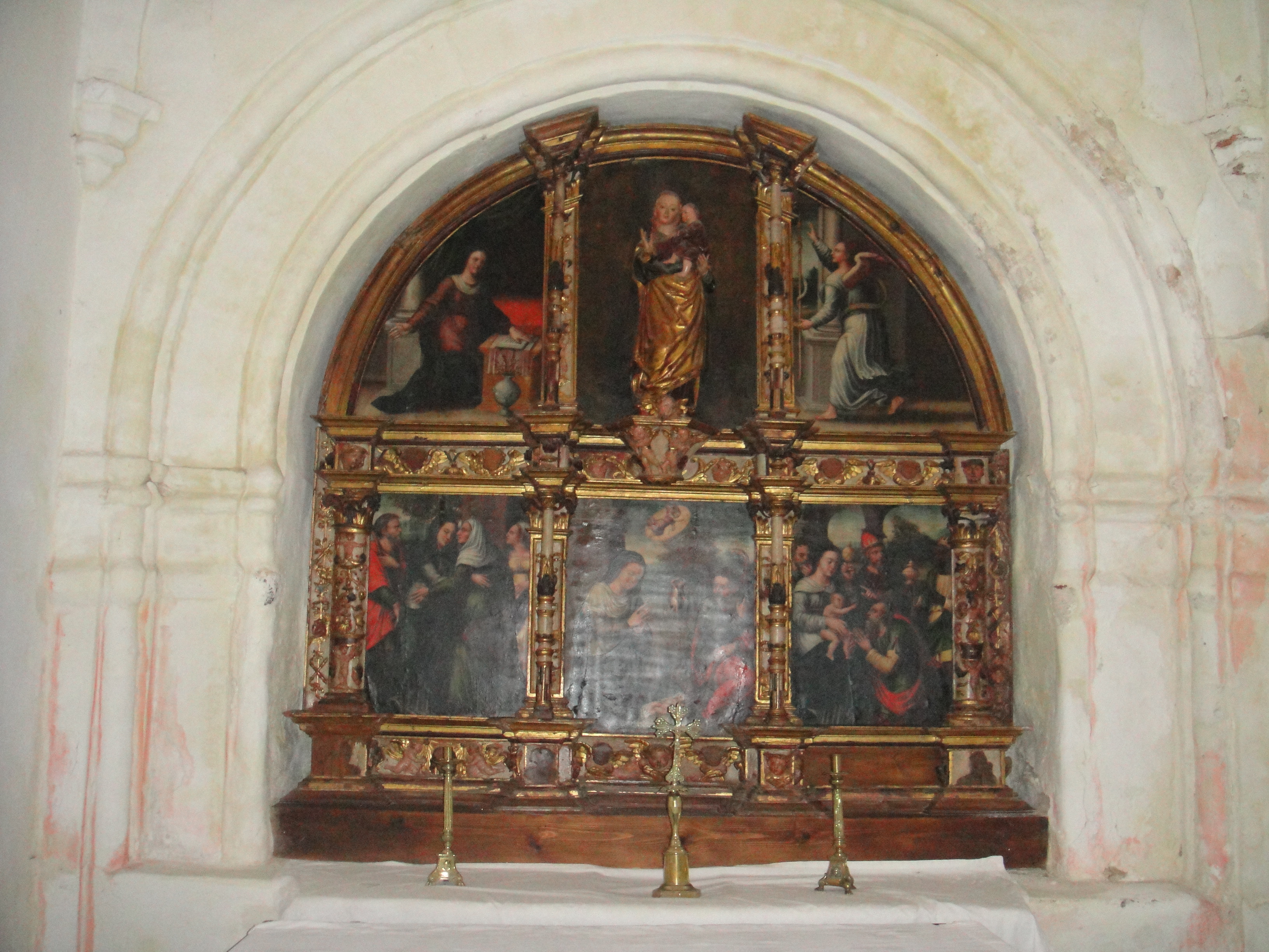 Retablo de la Virgen de Gracia de la iglesia de Nuestra Señora del Castillo de Fuente Obejuna, provincia de Córdoba, (España).